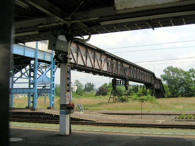 函館本線上砂川支線のホームへ続く跨線橋は残っている。 撮影場所 砂川駅駅前広場より。 撮影者によるGFDLリリース